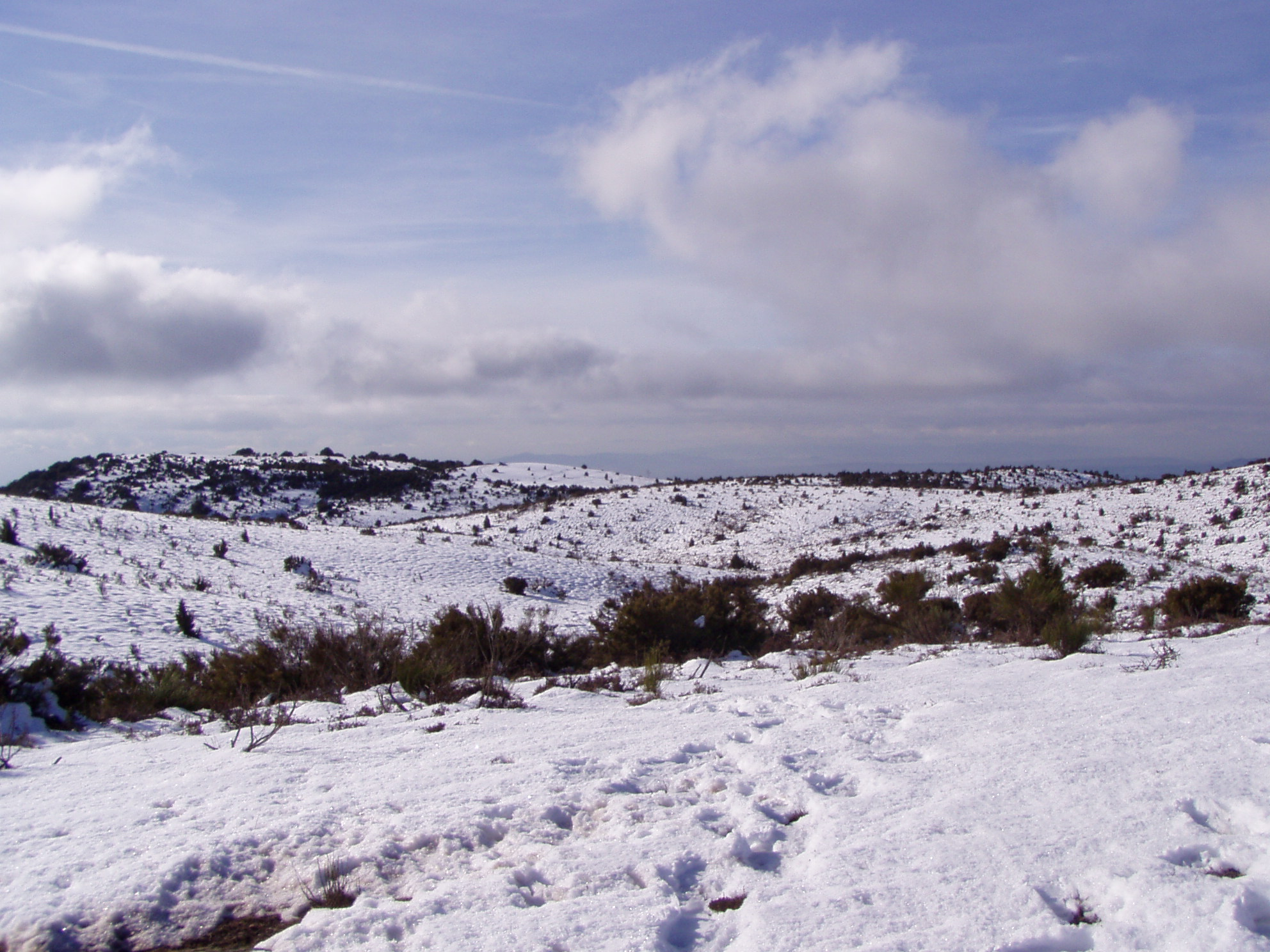 Pla de la Calma (Montseny-Tagamanent) Barcelona